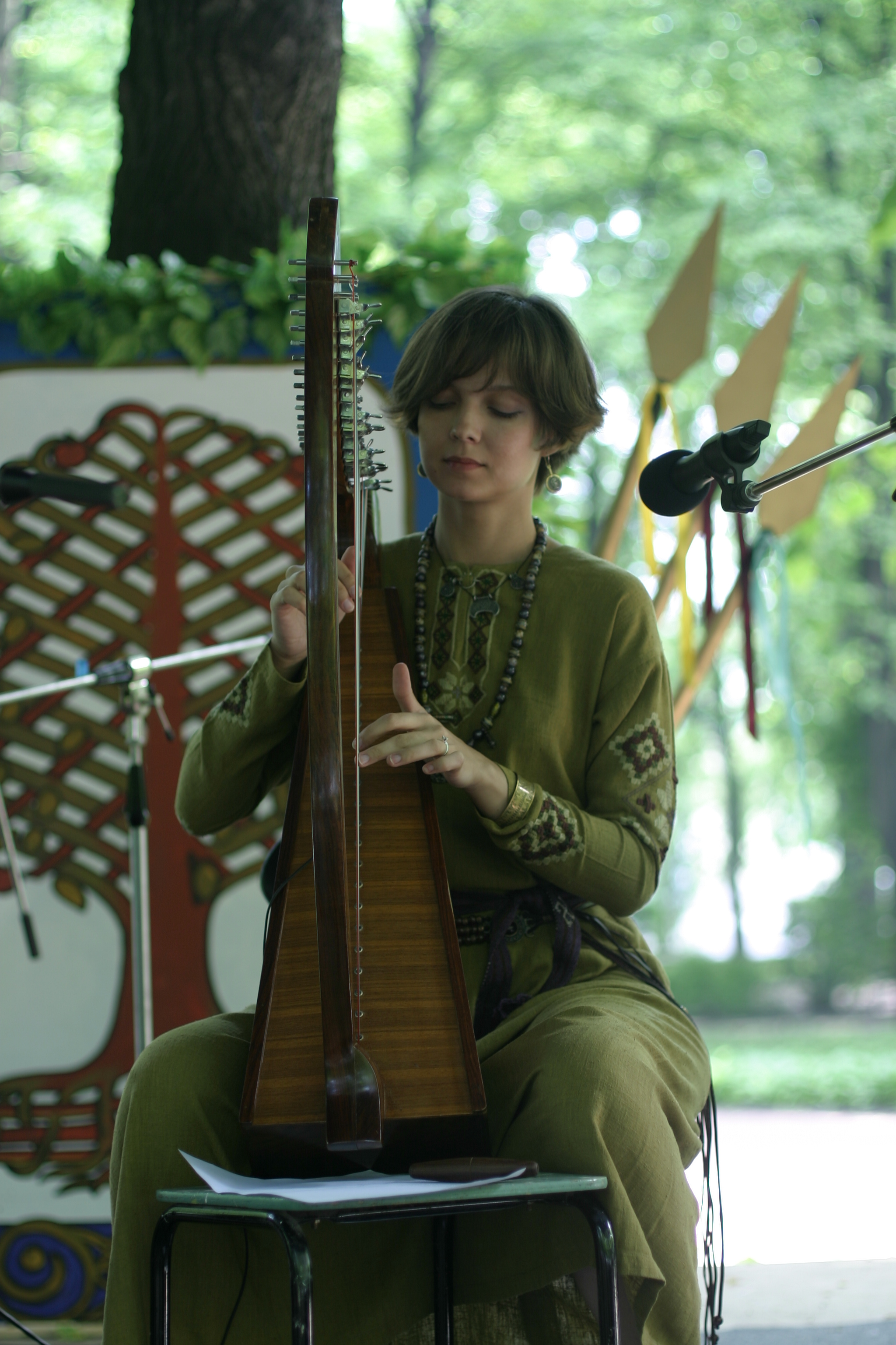 Natalia O'Shea. 26.06.2004